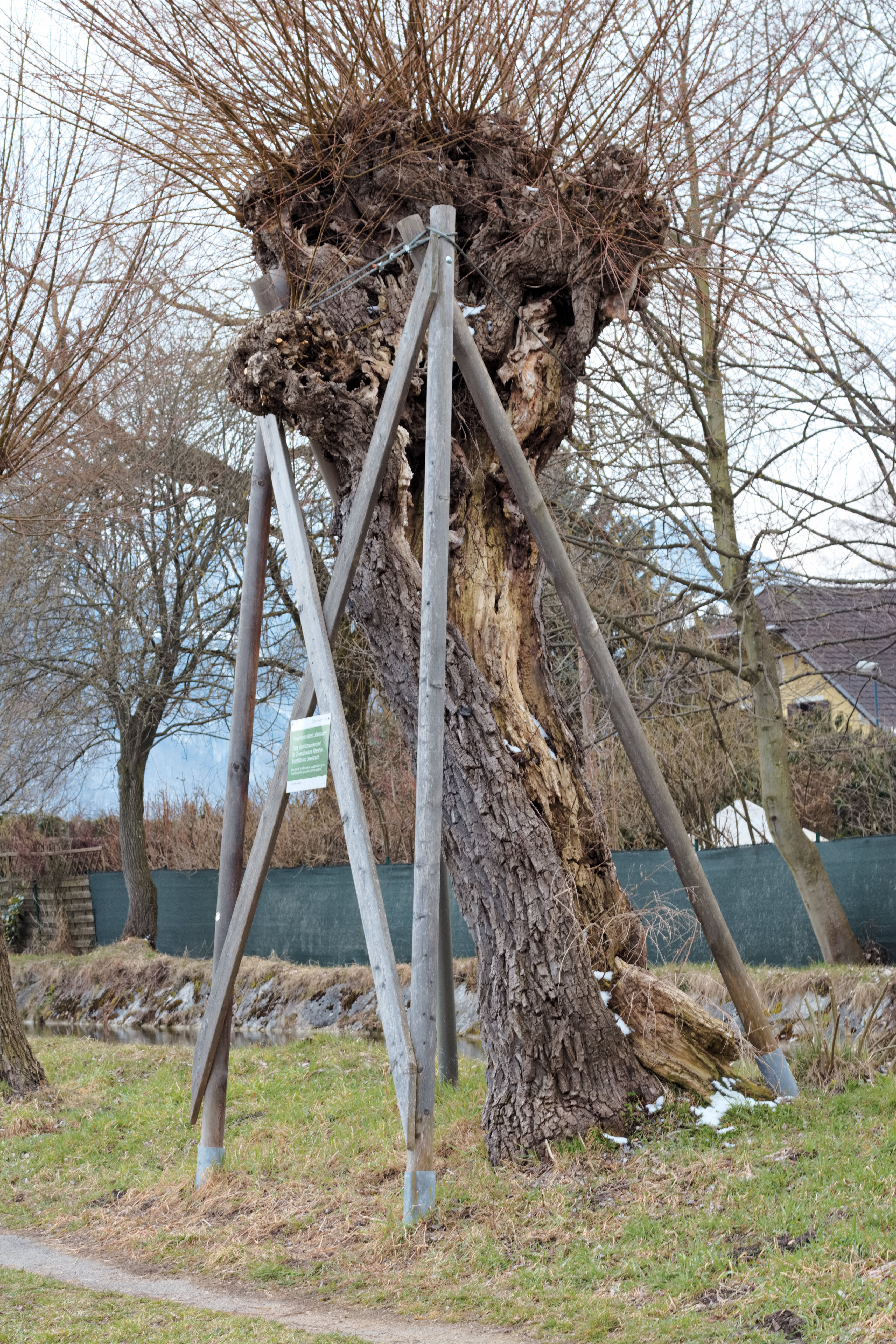 Schutzgebiet Kopfweiden am Almkanal in den Salzburger Stadtteilen Morzg und Gneis.